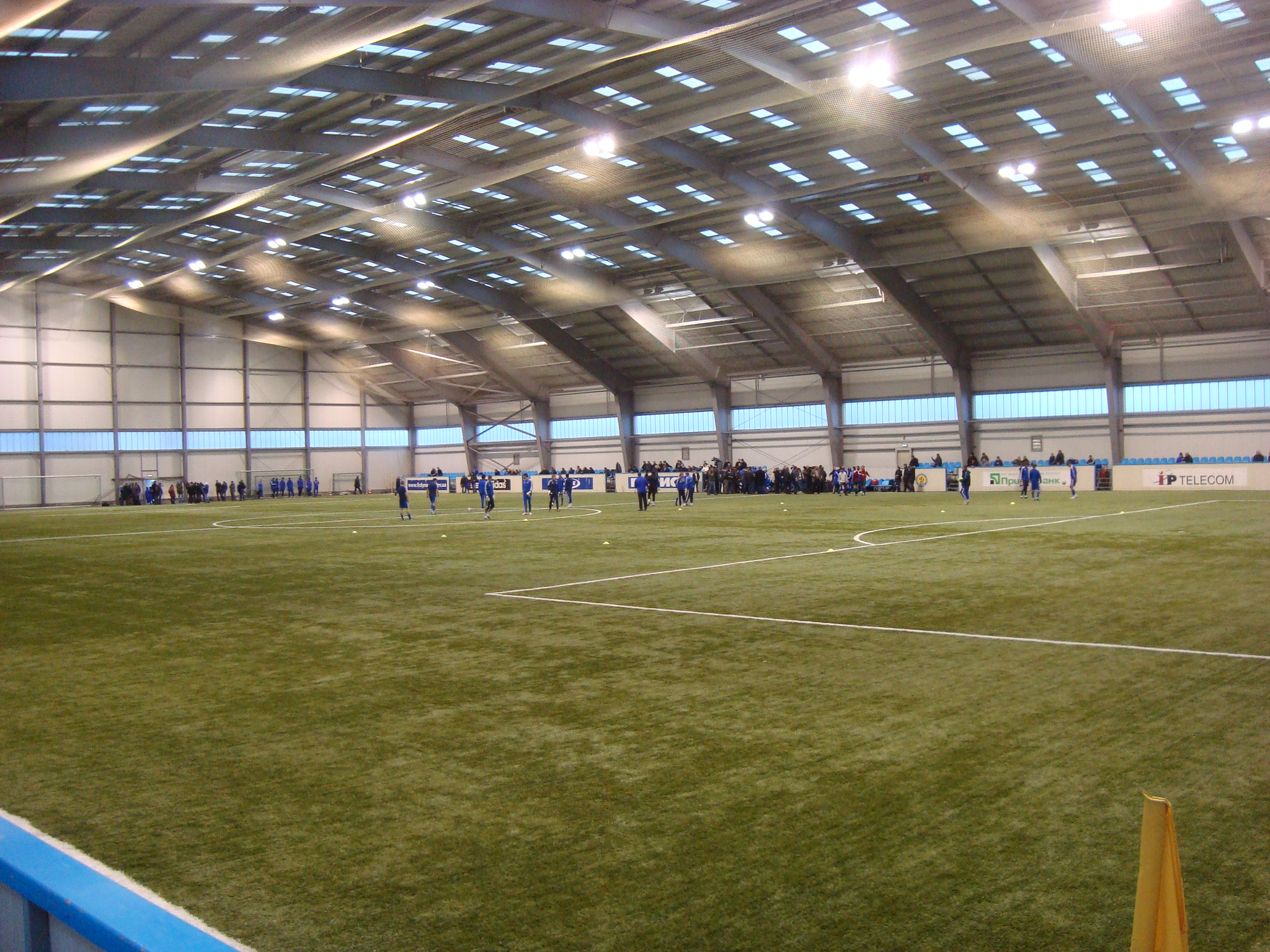 Манеж Навчально-тренувальної бази Динамо у Конча-Заспі